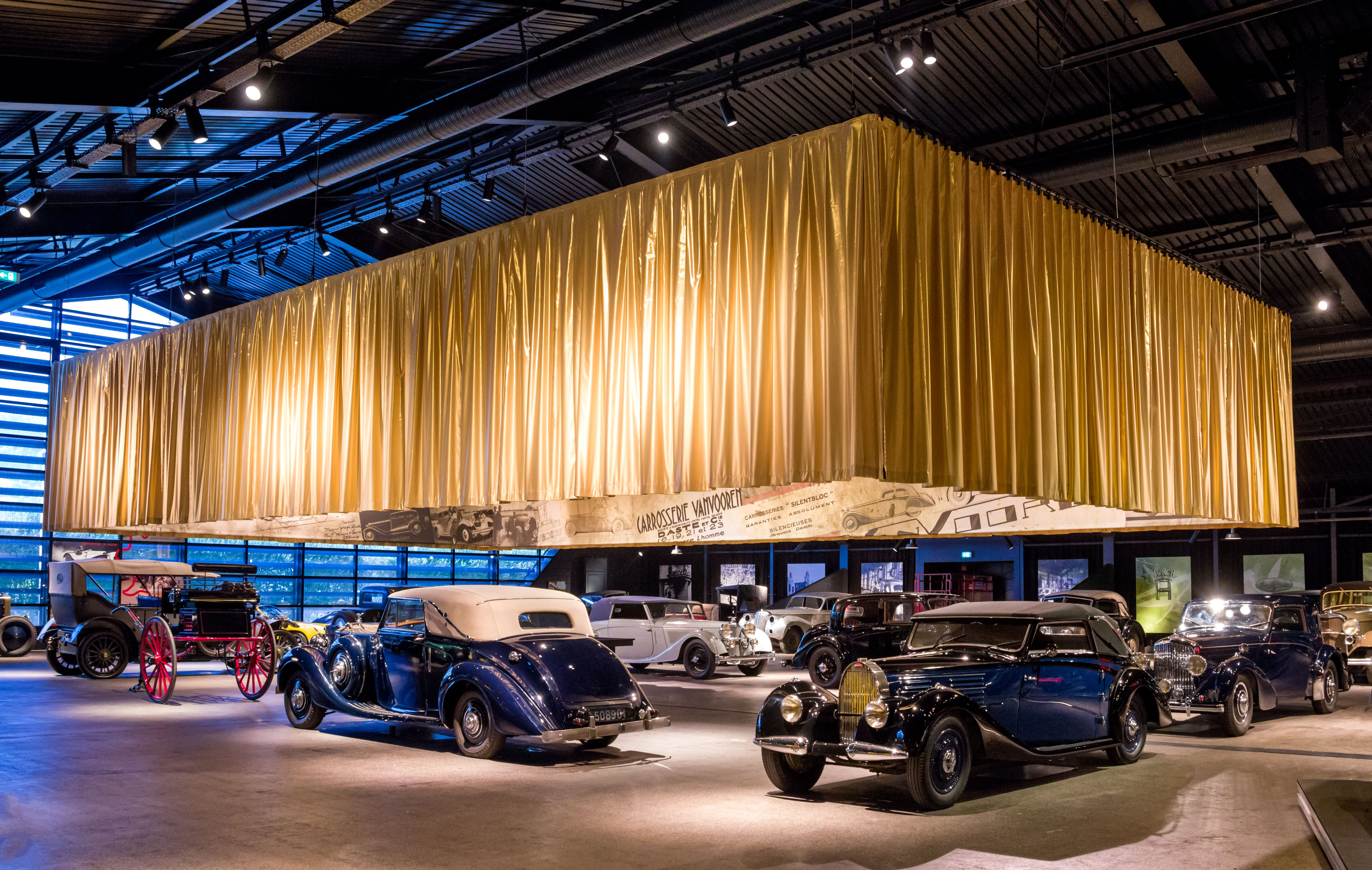 Das Volante Oldtimermuseum in Kirchzarten